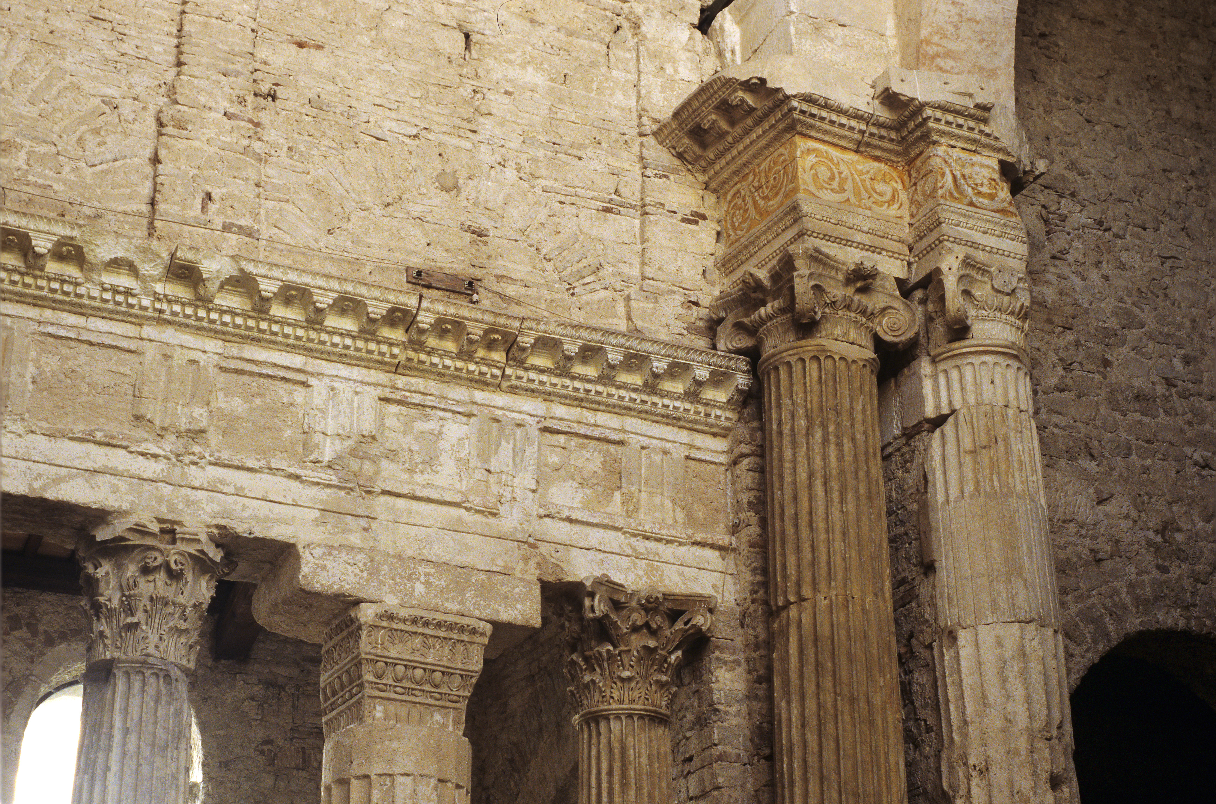 The super-elevated presbytery